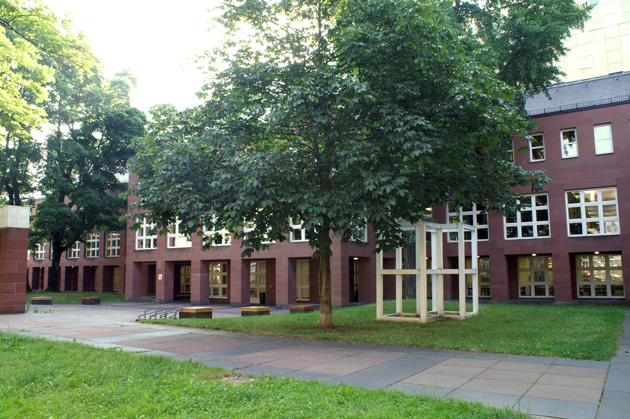 Fassade der Badischen Landesbibliothek, Skulpturengarten